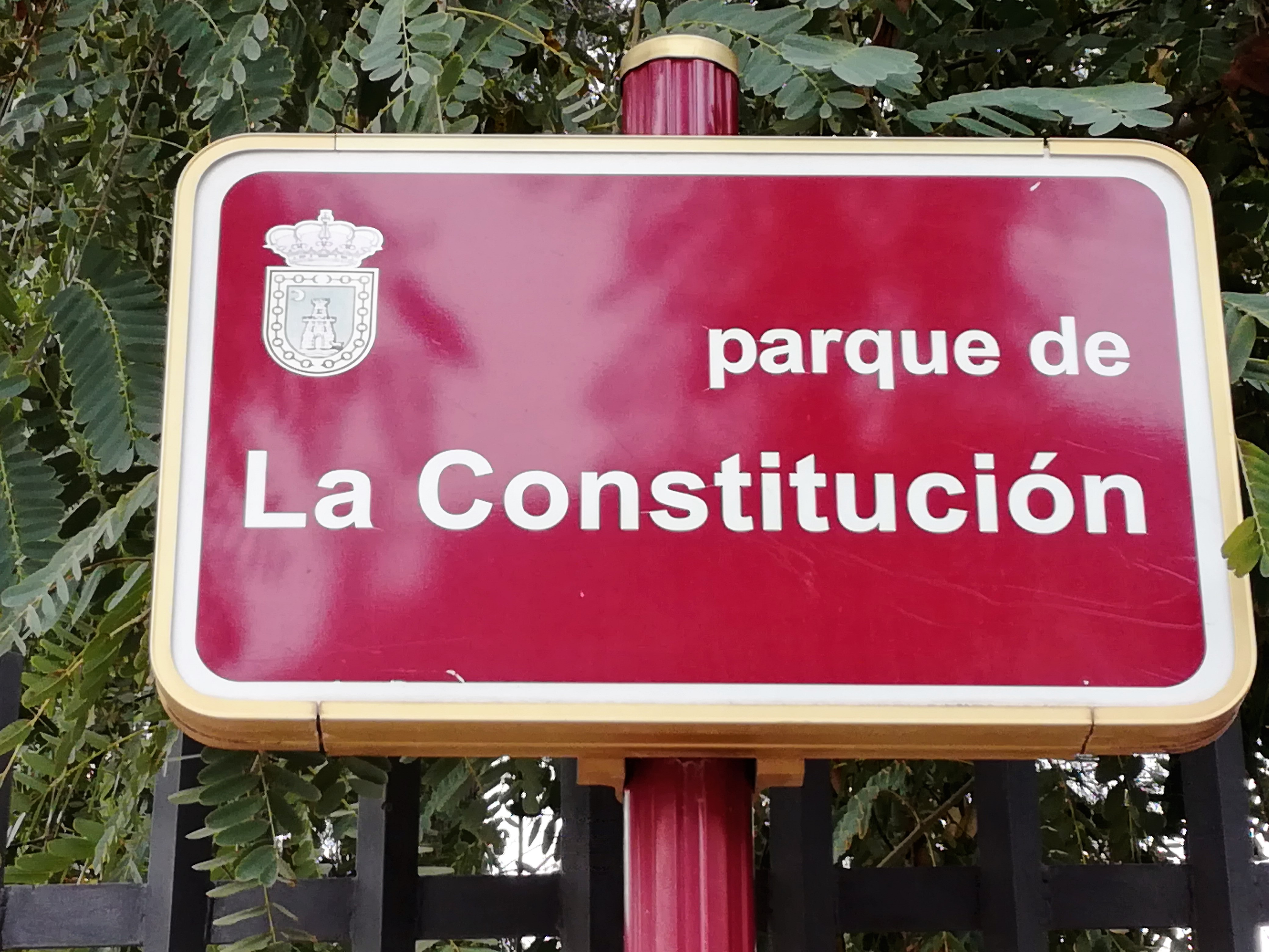 Letrero del parque